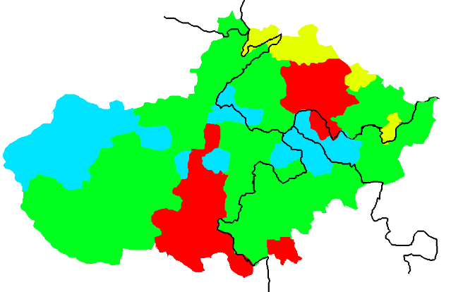 东部片区分布（部分）